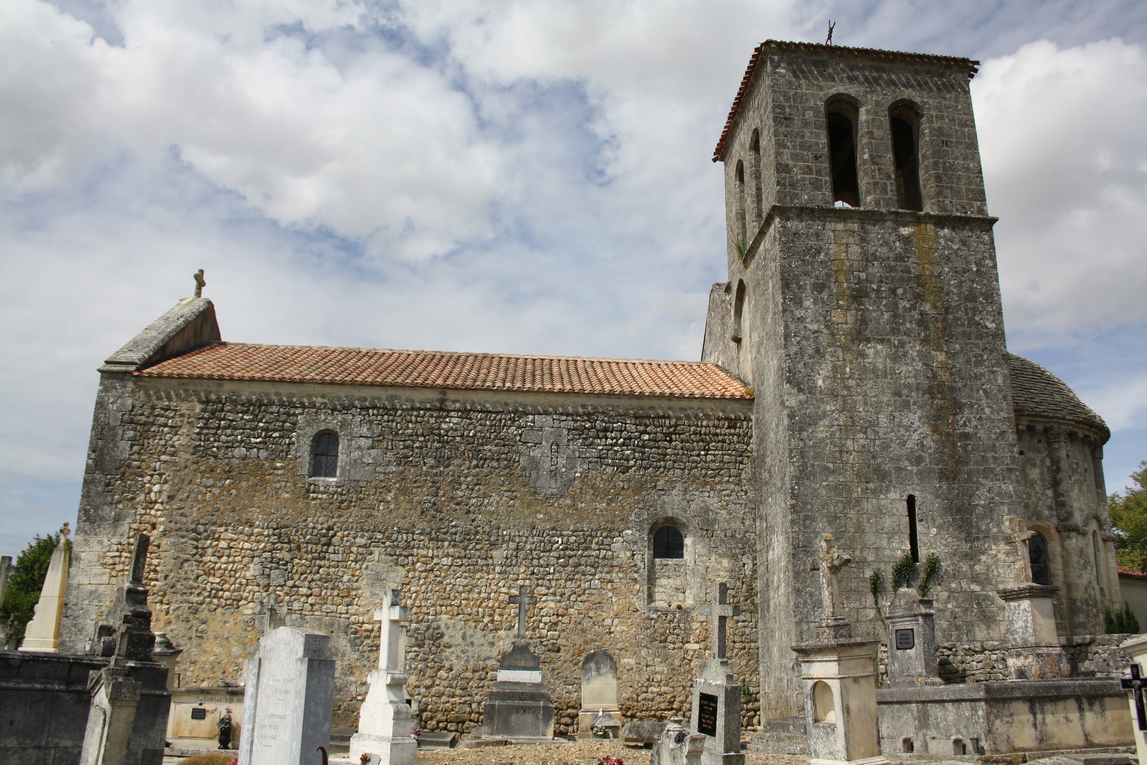 Église Saint-Martin de Taillant (Charente-Maritime, France).